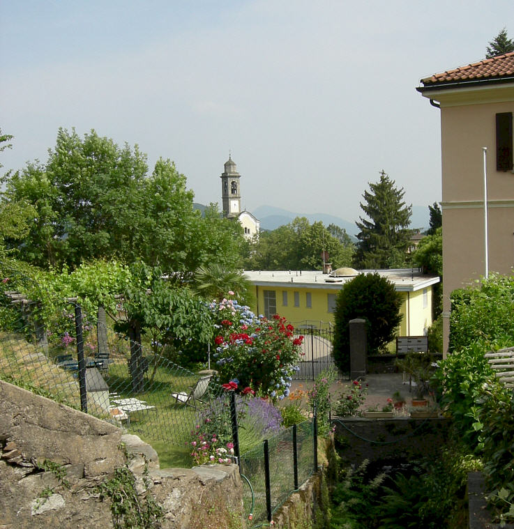 Blick auf Astano. Im Vordergrund das ehemalige Albergo Astano, im Hintergrund die Pfarrkirche San Pietro